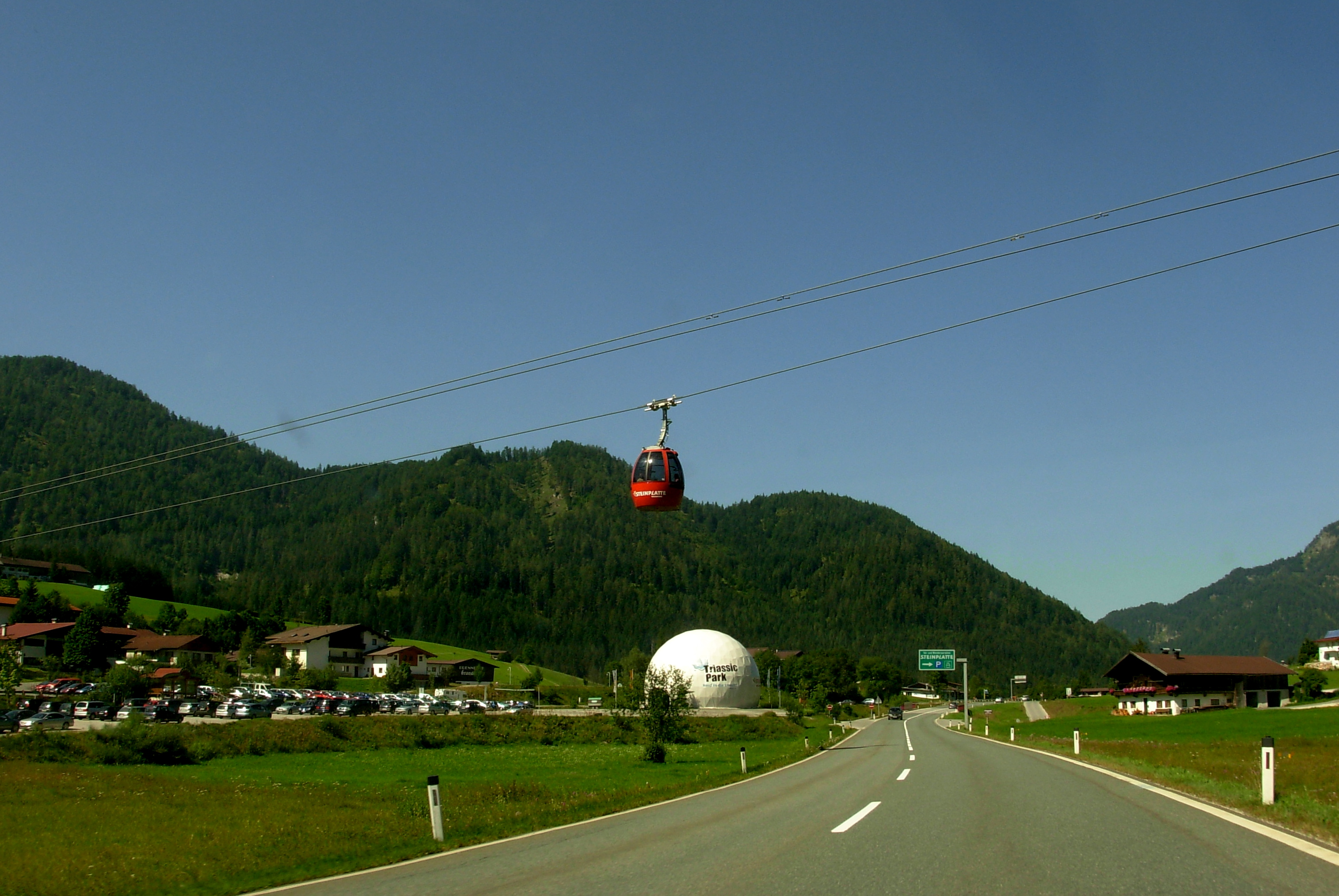 Keltuvai ir Triassic park Vaidringe